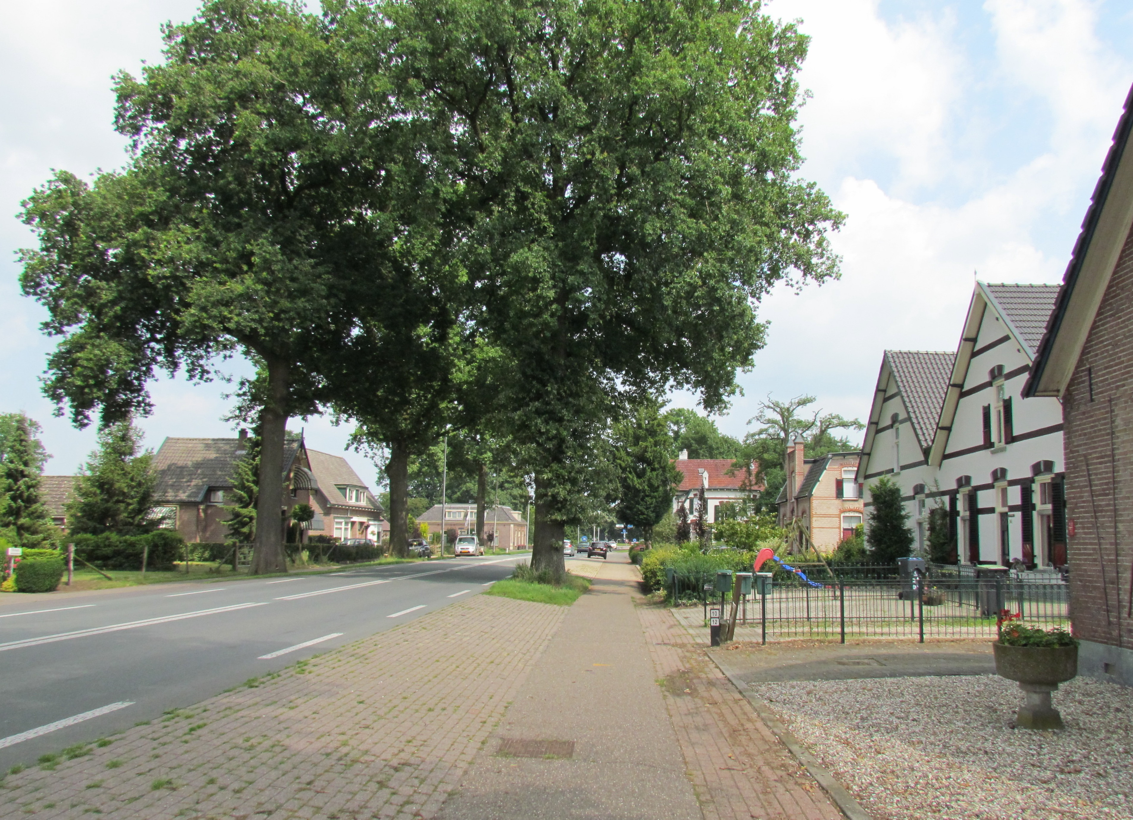 Westelijke tak van de Rijksstraatweg (N345) in Gietelo (gemeente Voorst, NL)